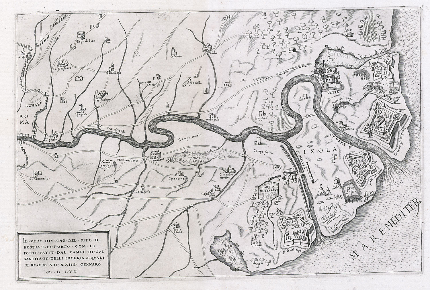 Il vero disegno del sito di Hostia e di Porto con li forti ...; Kupferstich, 1557